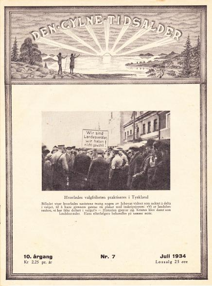 The Golden Age (July 1934) 10th year number 7. Danish: Den Gylne Tidsalder "Wir sind Landesverräter! Wir haben nicht gewählt!"